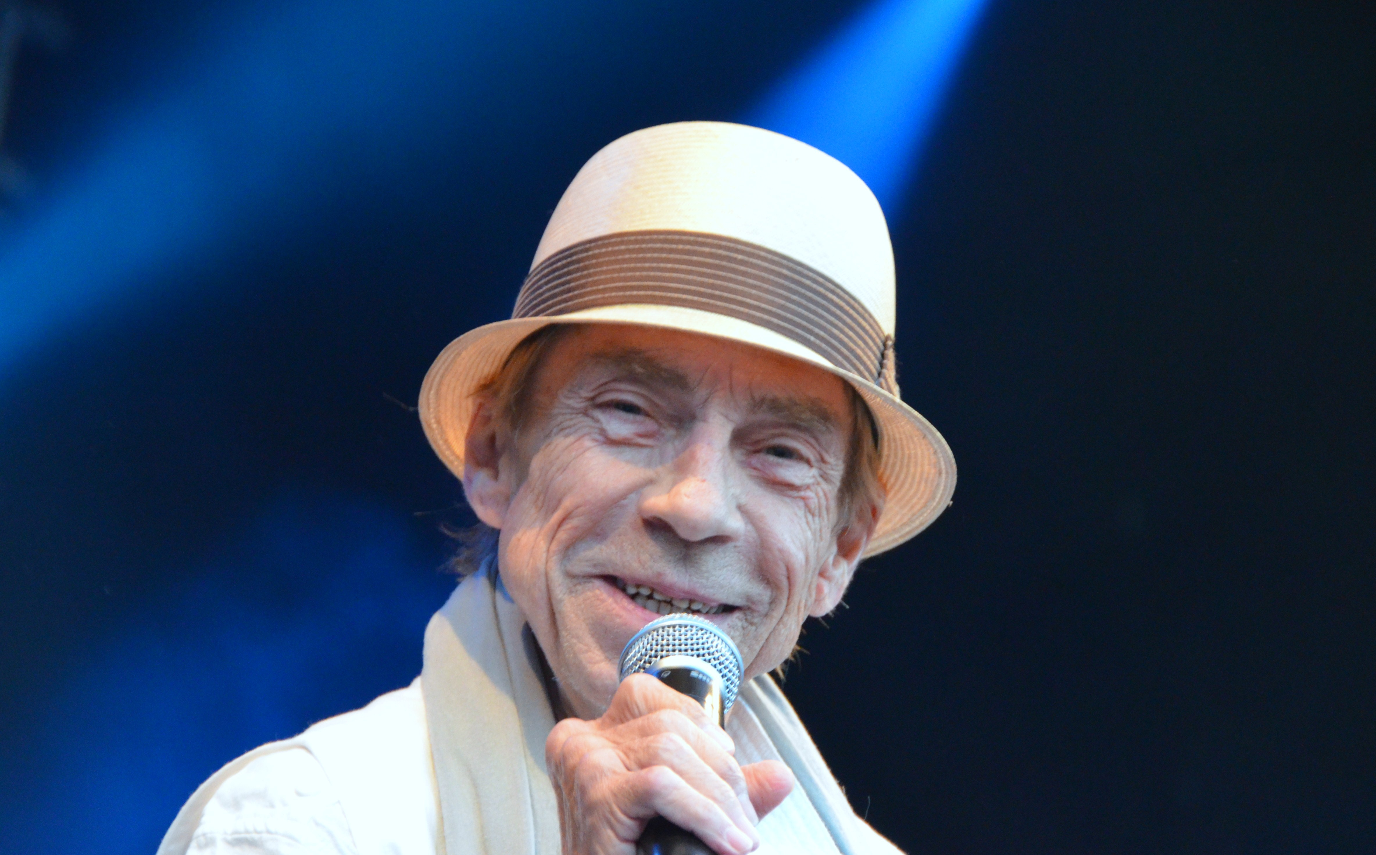 Jahn Teigen under en konsert i Langesund.